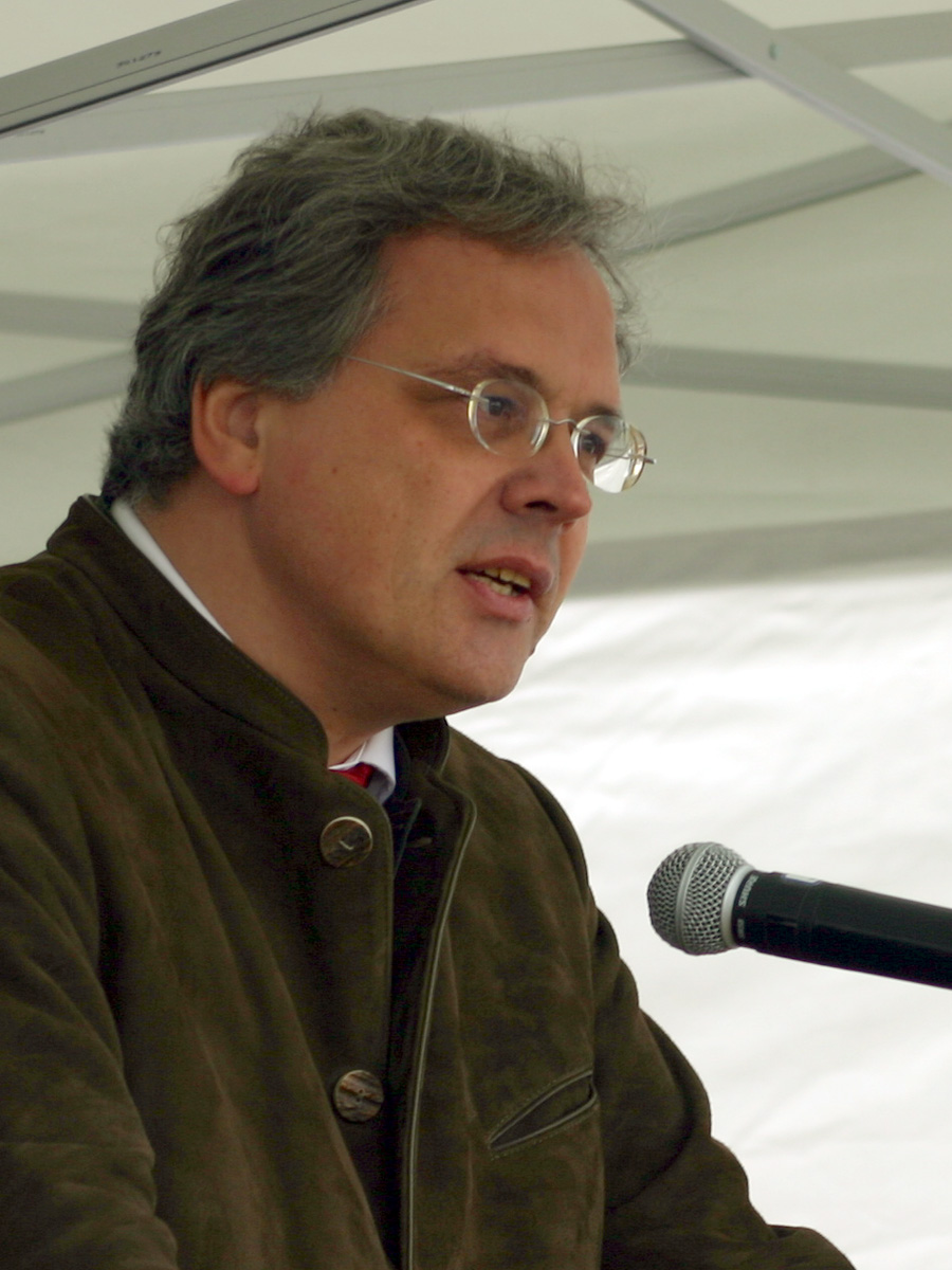 Christoph Hillenbrand (Regierungspräsident von Oberbayern)